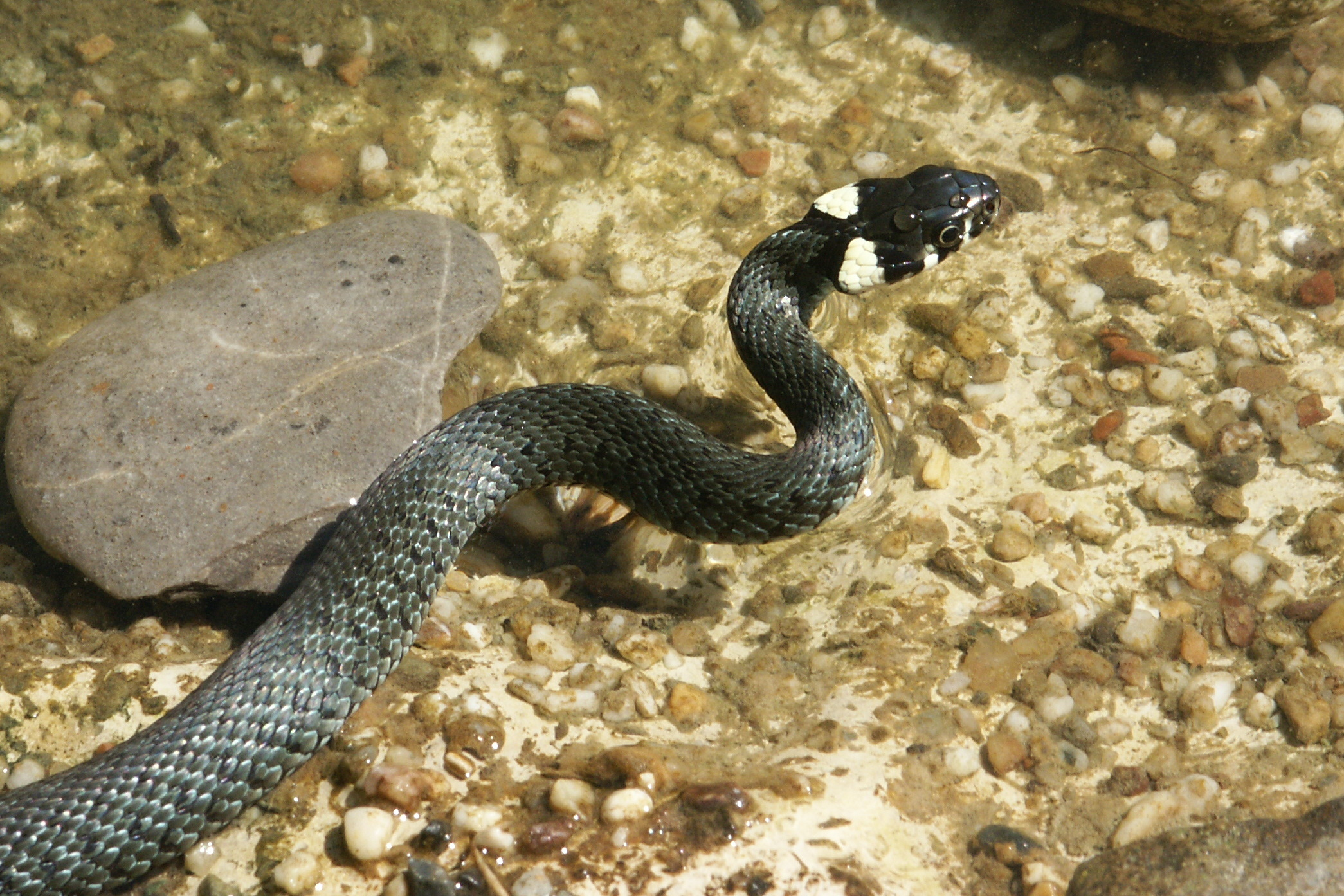 Ringelnatter